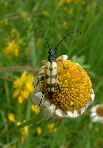 Lepture tachetée, Bucey-lès-Gy